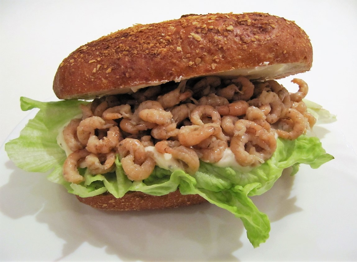 Krabbenfischbrötchen